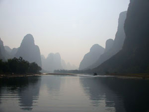 桂林漓江风光 关于版权：自己拍摄的照片。-Vincivinci